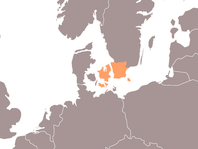 Greater Copenhagen - et erhvervspolitisk partnerskab mellem kommuner og regioner i Østdanmark og Sydsverige.